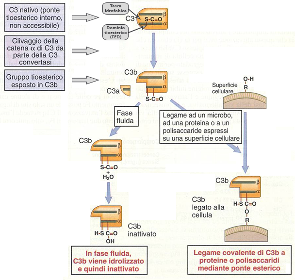 Clivaggio del fattore C3 del complemento ad opera dell'enzima C3-convertasi